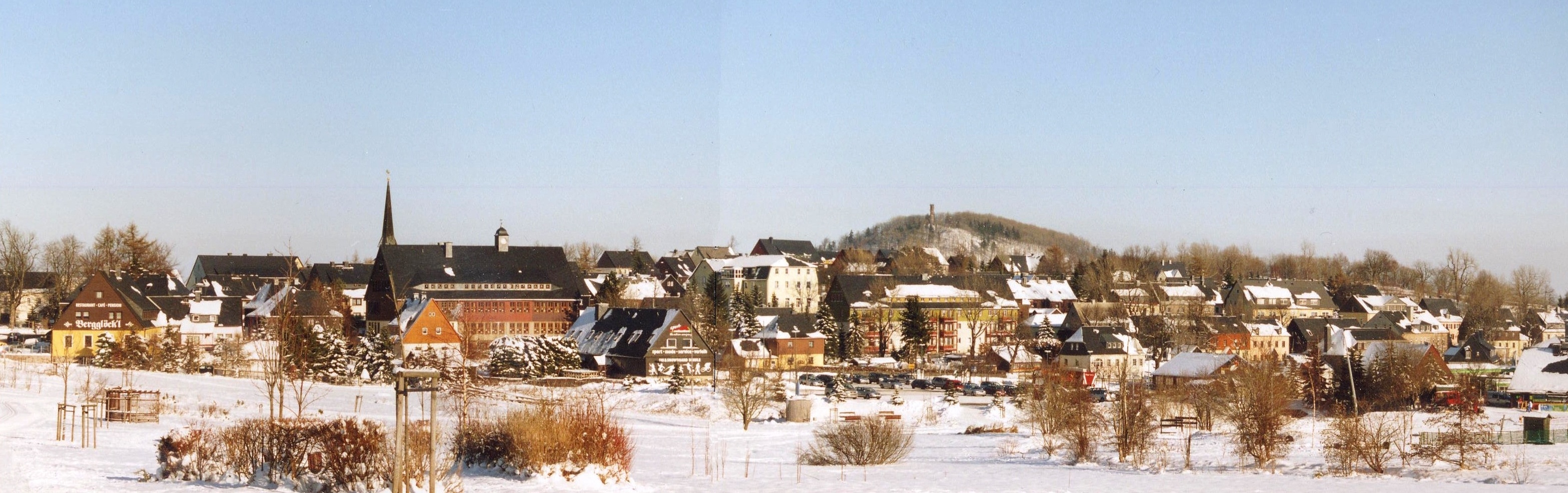 Altenberg: Blick auf die Stadt und den Geisingberg